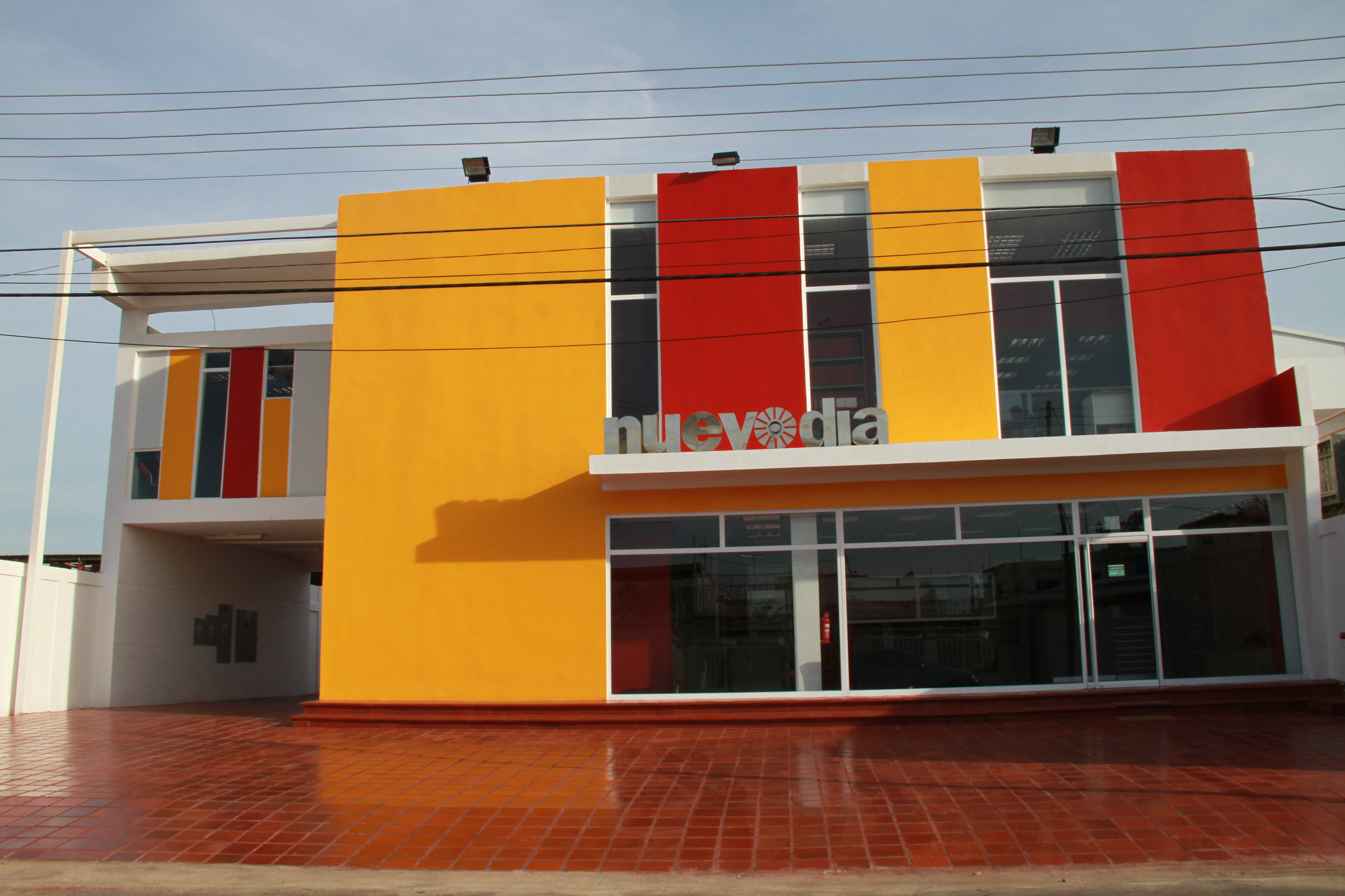 Frente de nueva sede del Diario Nuevo Día en Punto Fijo, Estado Falcón.